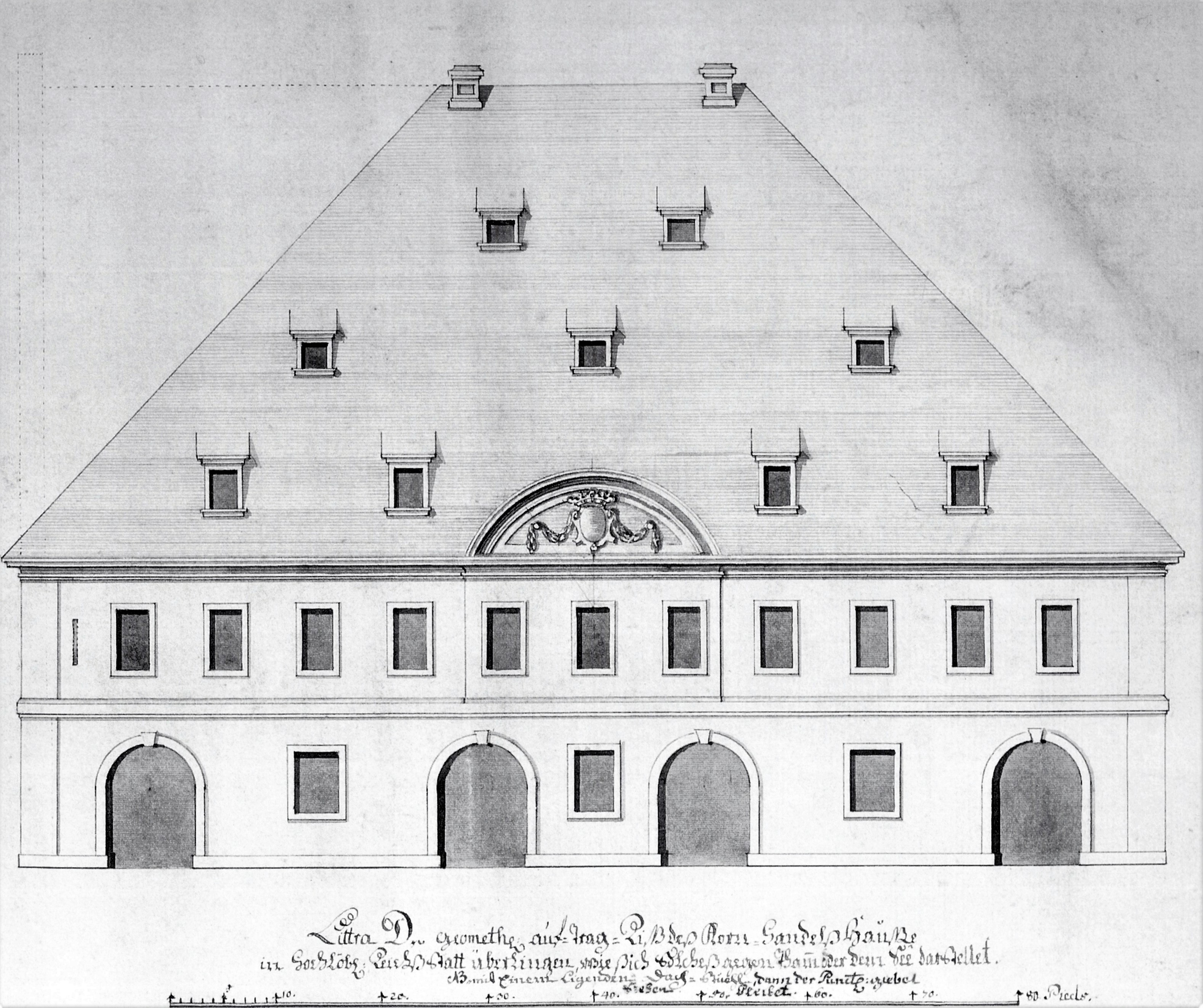 Entwurf der Greth von 1788